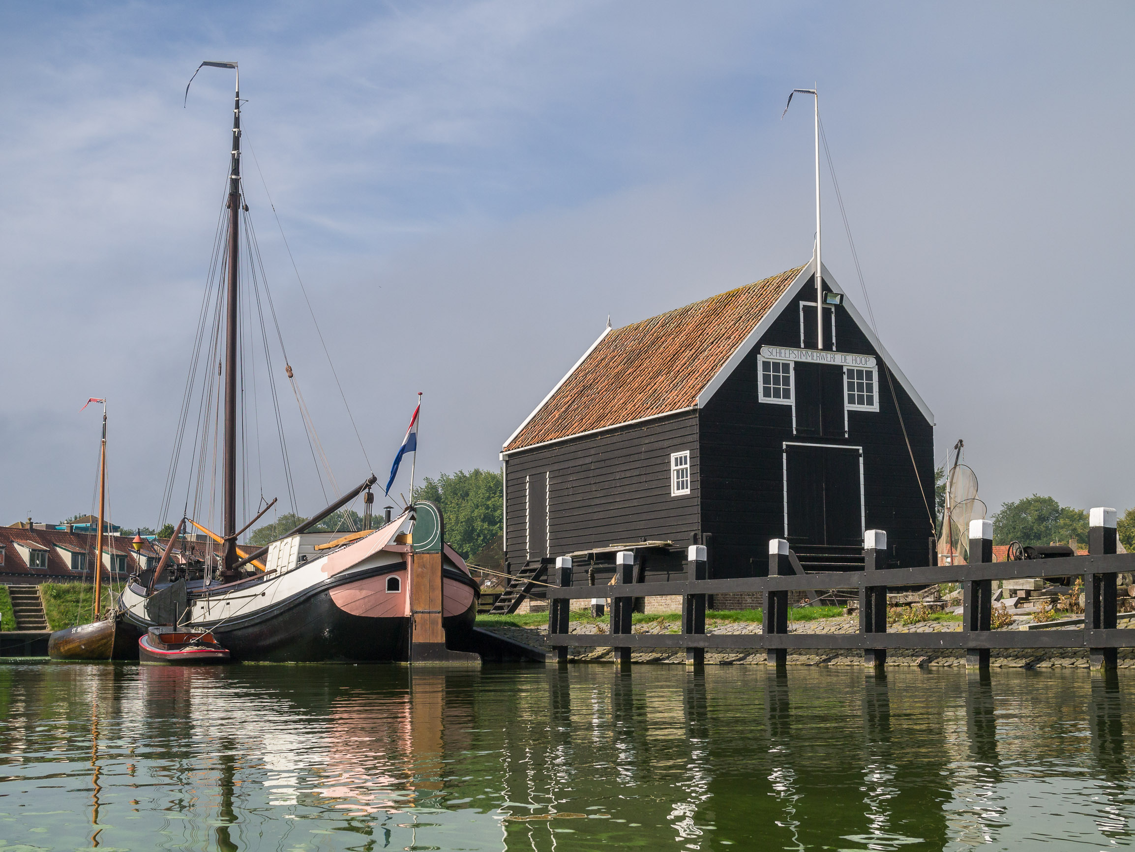 Zuiderzeemuseum Enkhuizen - Scheepstimmerwerf de Hoop